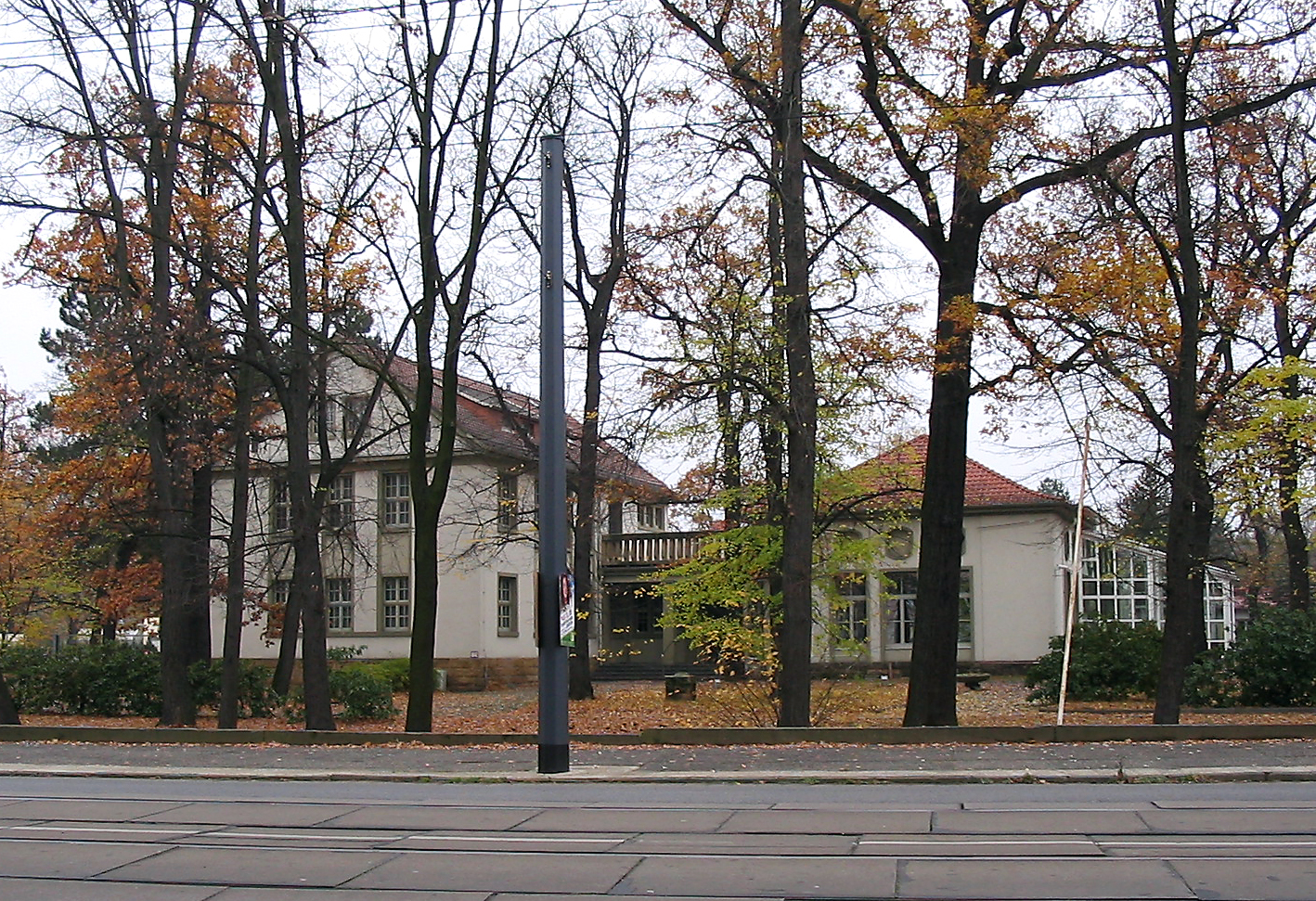 Radebeul, Chemische Fabrik v. Heyden, Büro- und Aufenthaltsgebäude Meißner Straße 30, 2008